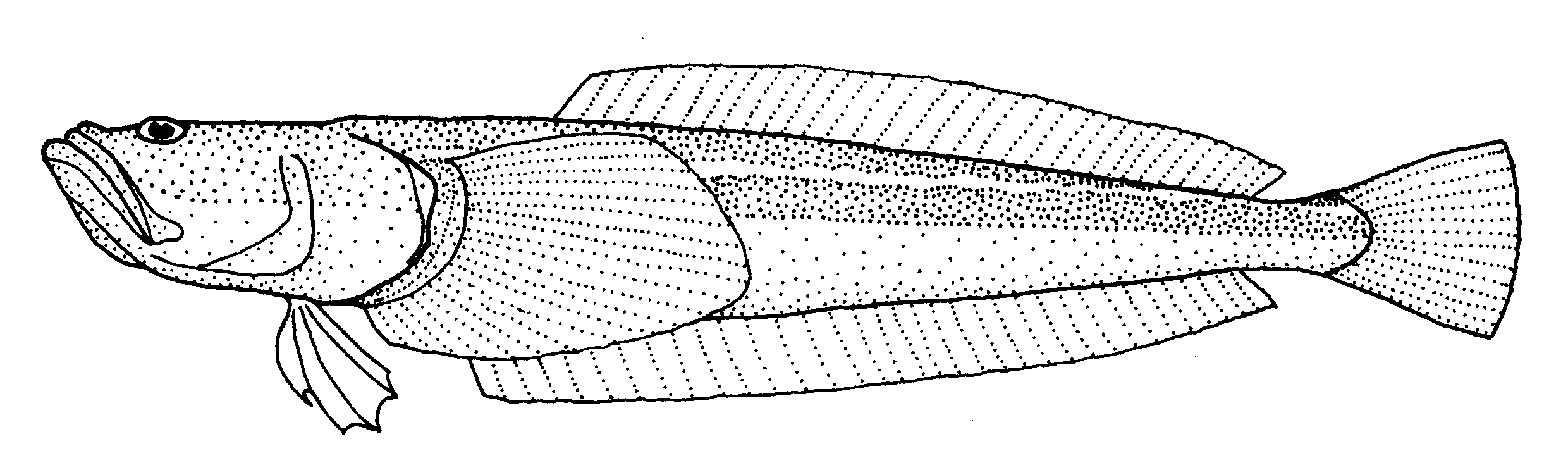 Leptoscopus macropygus (Estuary stargazer)